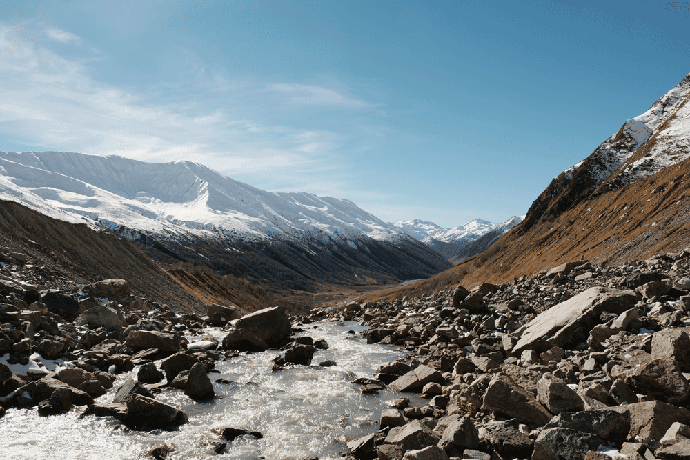 Blick in das obere Engurital vom Gletscher des Schchara aus.